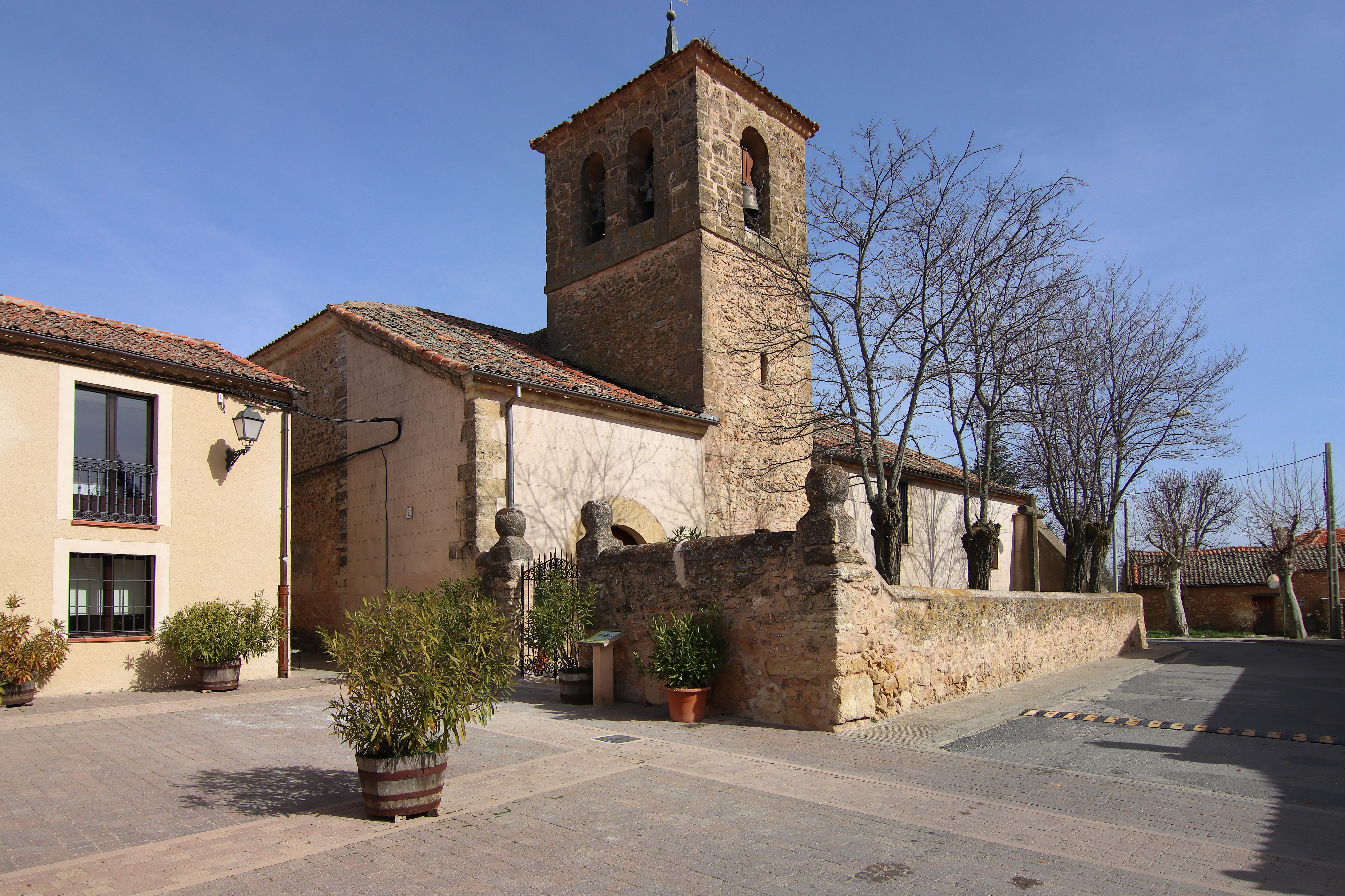 Iglesia de Santiago Apóstol, Brieva, torre